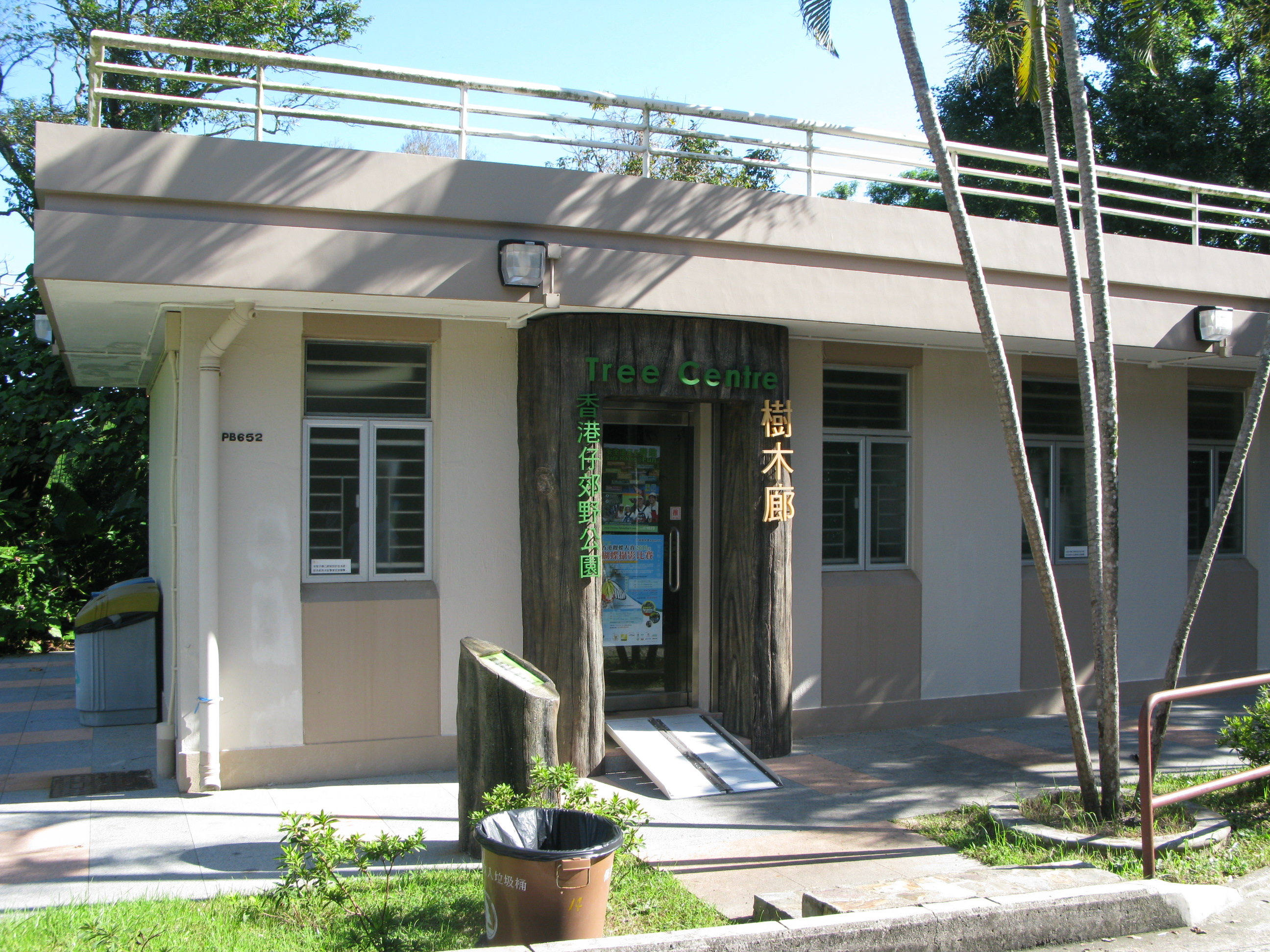 中文（香港）: 香港香港仔郊野公園樹木廊